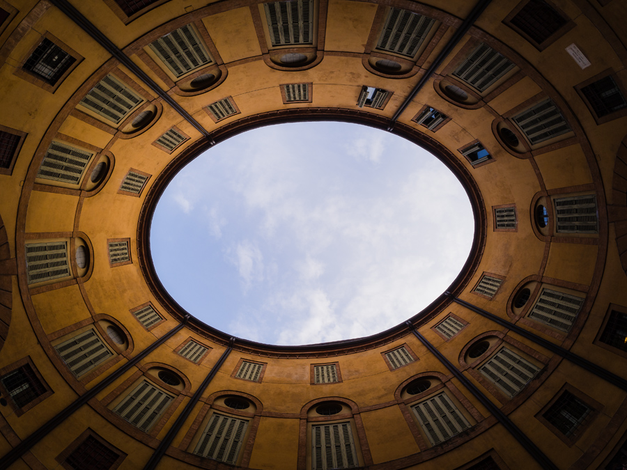 Teatro Comunale This is a photo of a monument which is part of cultural heritage of Italy.